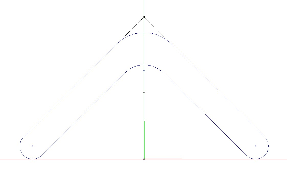 dimensions d'un boomerang